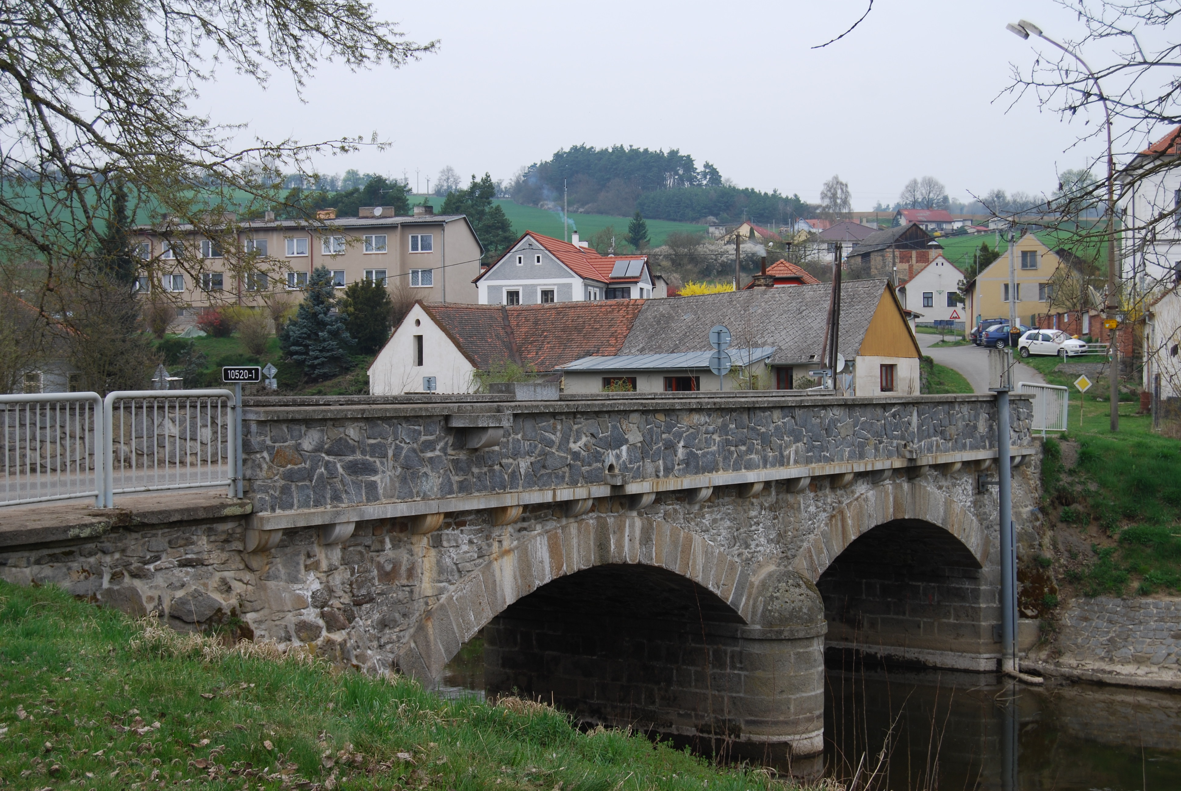 Kamenný most přes potok Mastník. Obec Radíč se nachází v okrese Příbram, kraj Středočeský. Česká republika.